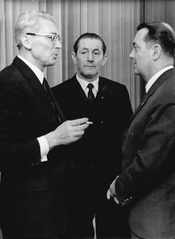 Zentralbild Koard 10.2.1970 Berlin: Staatsratskommission beriet über Entschlußentwurf zur sozialistischen Kommunalpolitik. Während einer Sitzungspause im Gespräch v.l.n.r.: der Oberbürgermeister von Berlin, Herbert Fechner; der Stellvertreter des Vorsitzenden des Staatsrates, Hans Rietz, und Minister Scharfenstein. Die Kommission des Staatsrates der DDR für die öffentliche Diskussion des "Entwurfs des Beschluses zur weiteren Gestalung des Systems der Planung und Leitung der wirtschaftlichen und gesellschaftlichen Entwicklung, der Versorgung und Betreuung der Bevölkerung in den Bezirken, Kreisen, Städten und Gemeinden" beriet am 10.2.70 im Amtssitz des Staatsrates unter Vorsitz Minister Scharfensteins.